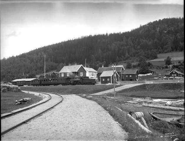 Finsand stasjon, Øvre Ådal, Ringerike